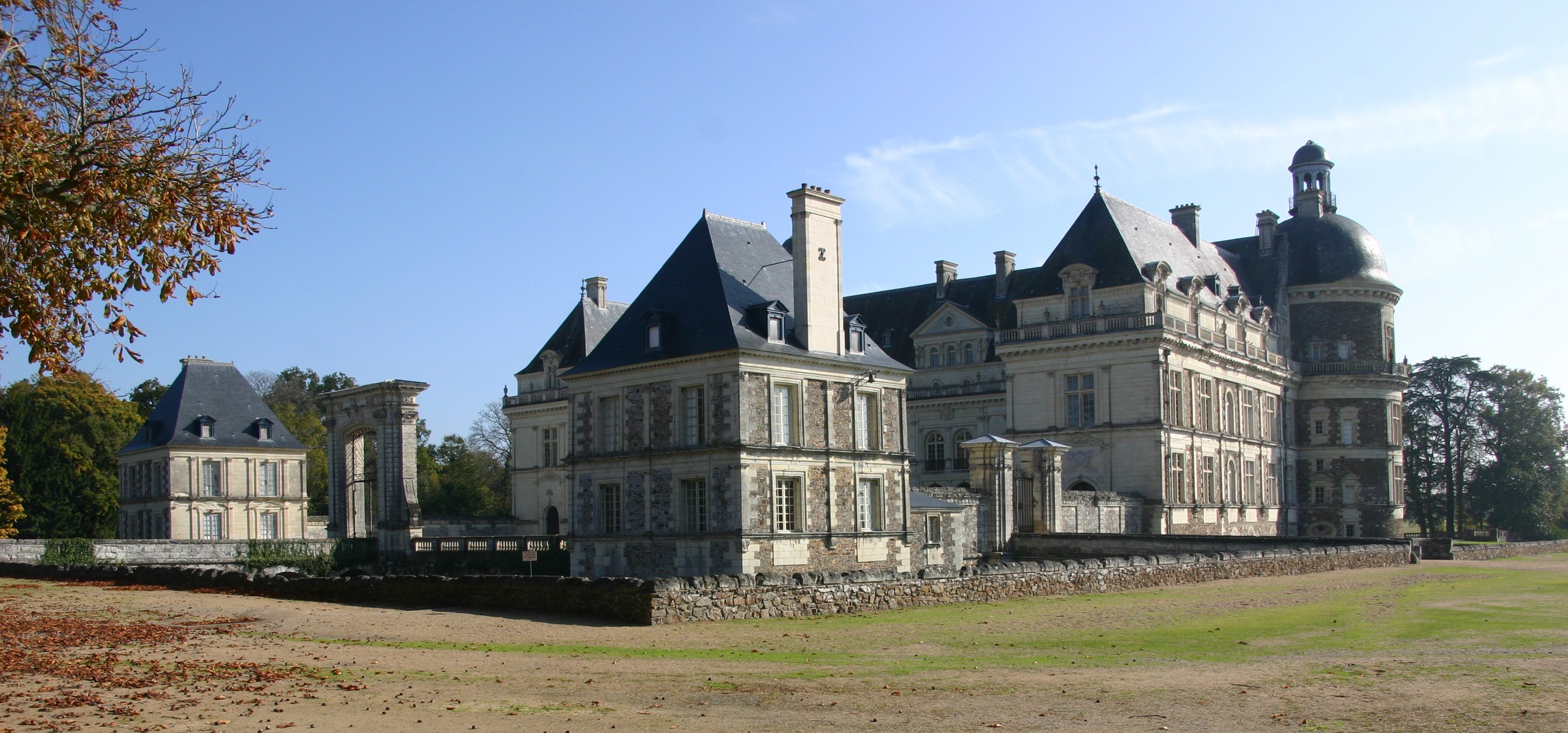 Schloss Serrant